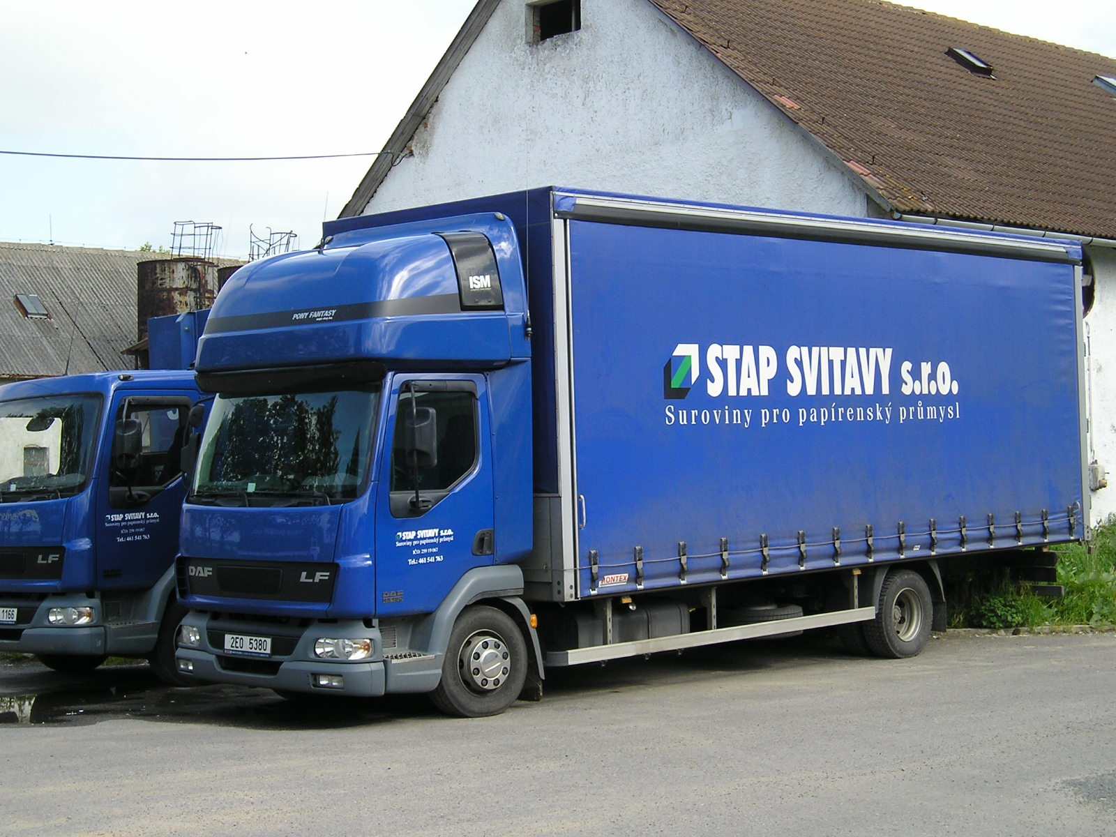 DAF LF 45